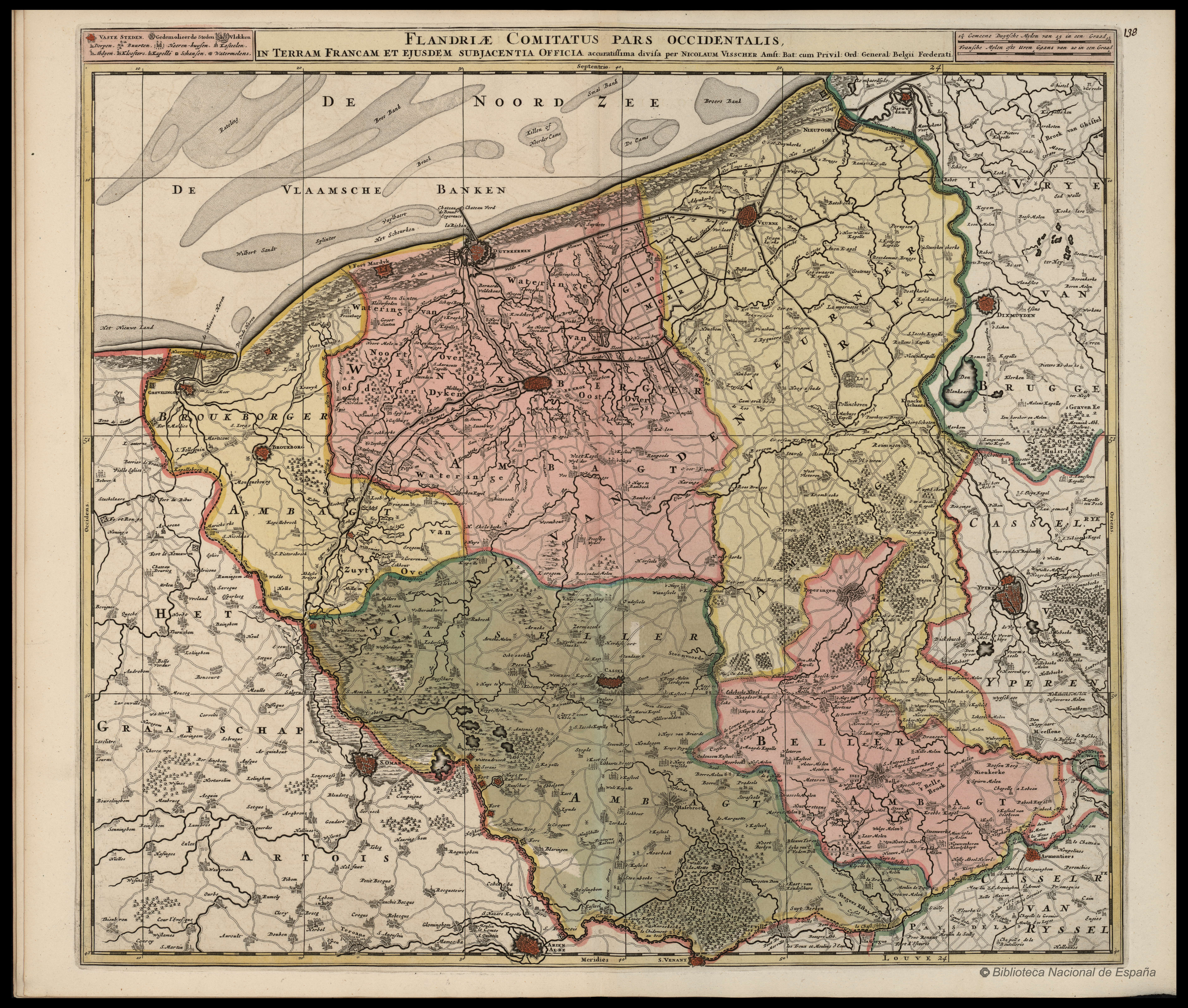 Flandriæ Comitatus Pars Occidentalis; size: 51x56